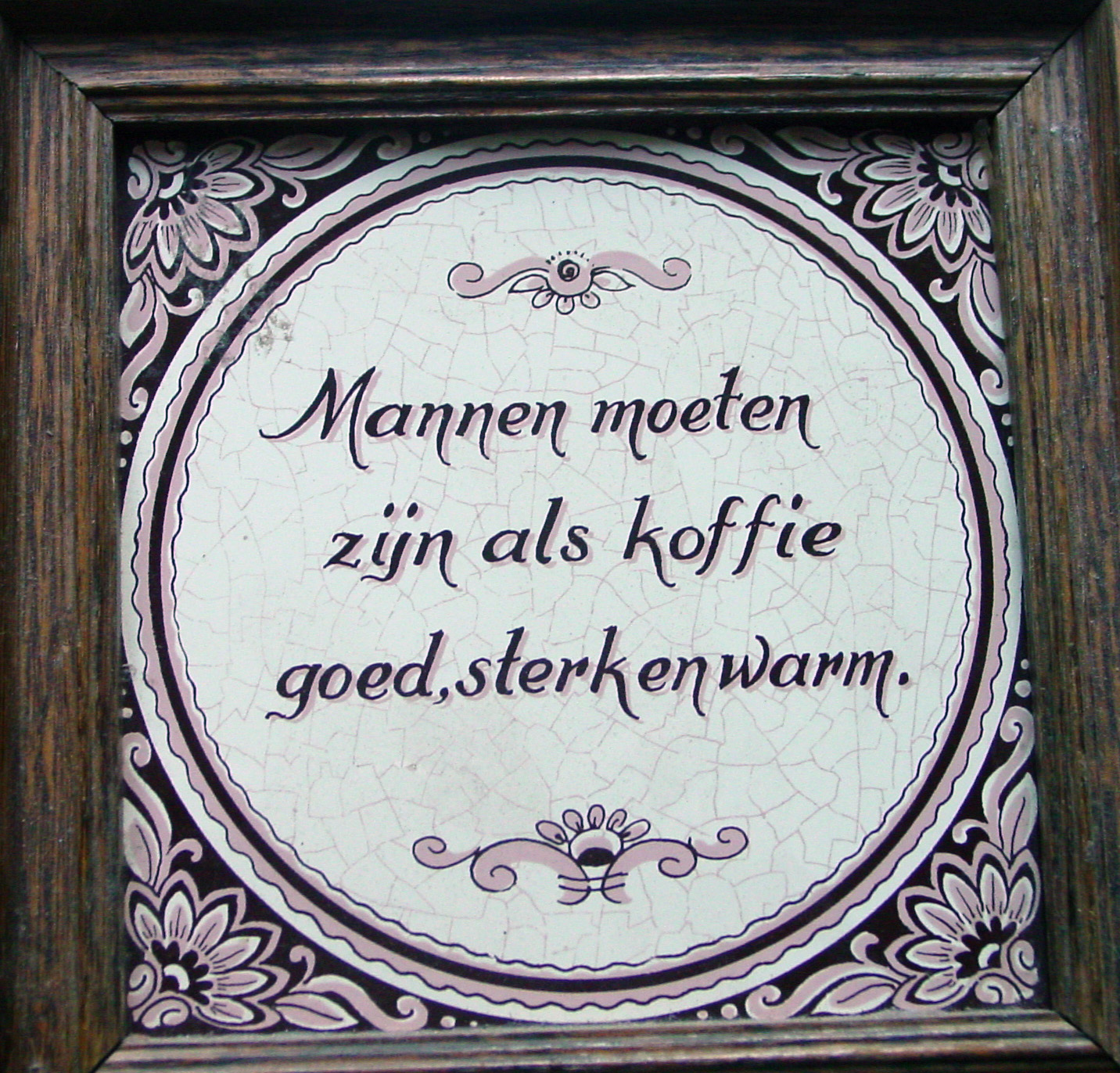 tegelwijsheid